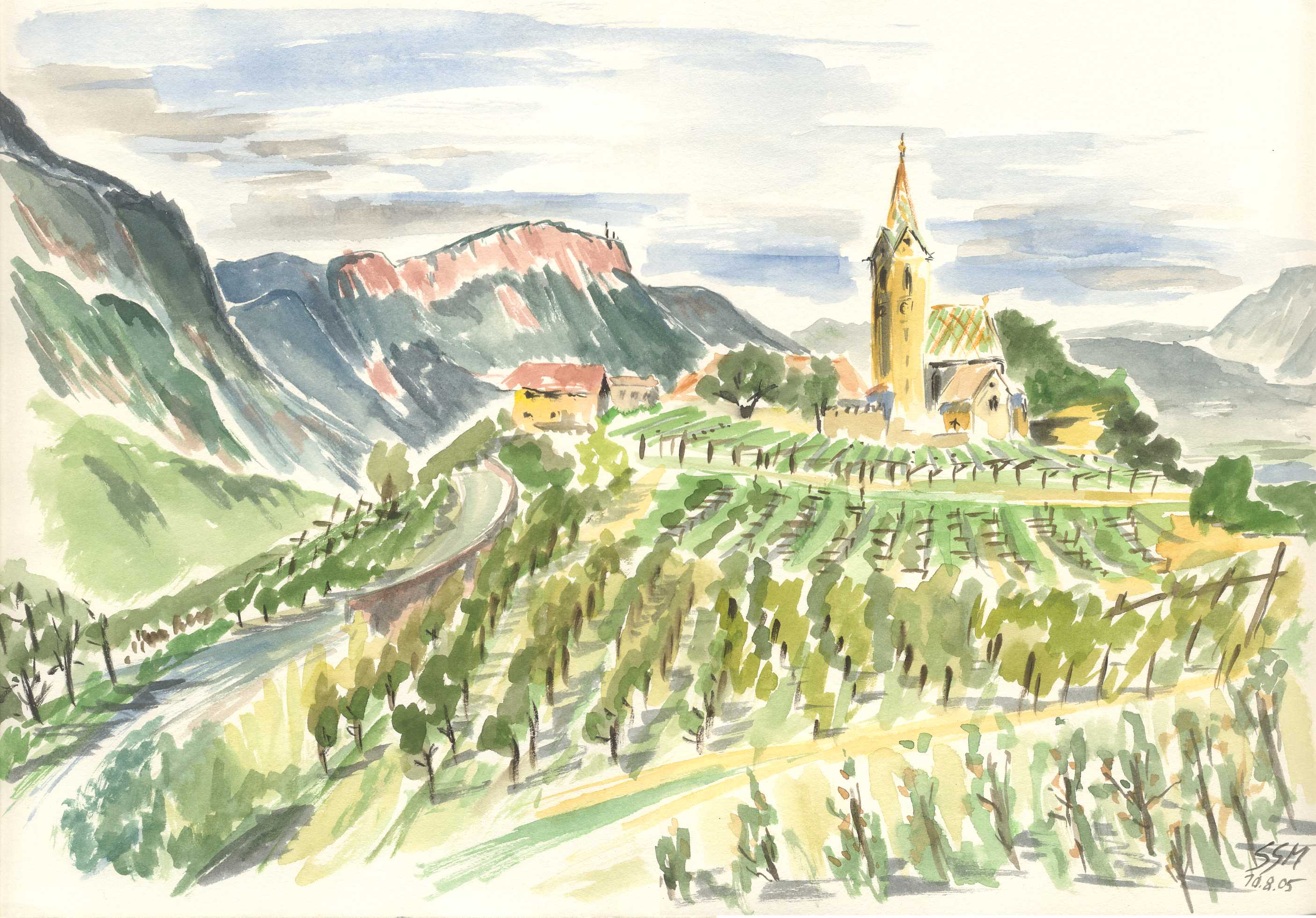 St. Vigil in Altenburg (Kaltern). Aquarell von Siegfried Schieweck-Mauk, Eichstätt (Bayern)